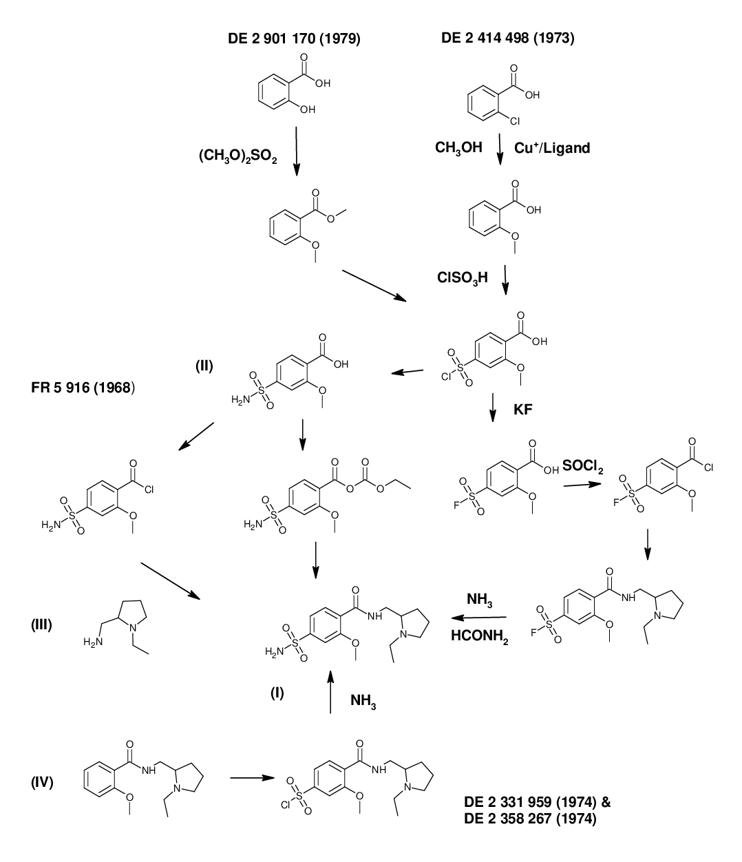 Übersicht der wichtigsten Synthesen von Sulpirid